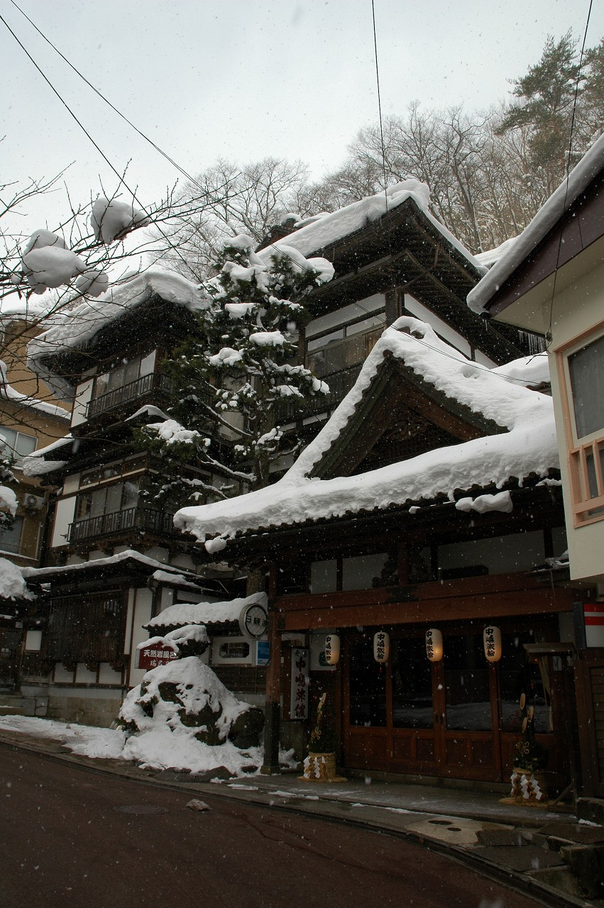 中嶋旅館 撮影者：利用者:EMPEX 2006.01.07